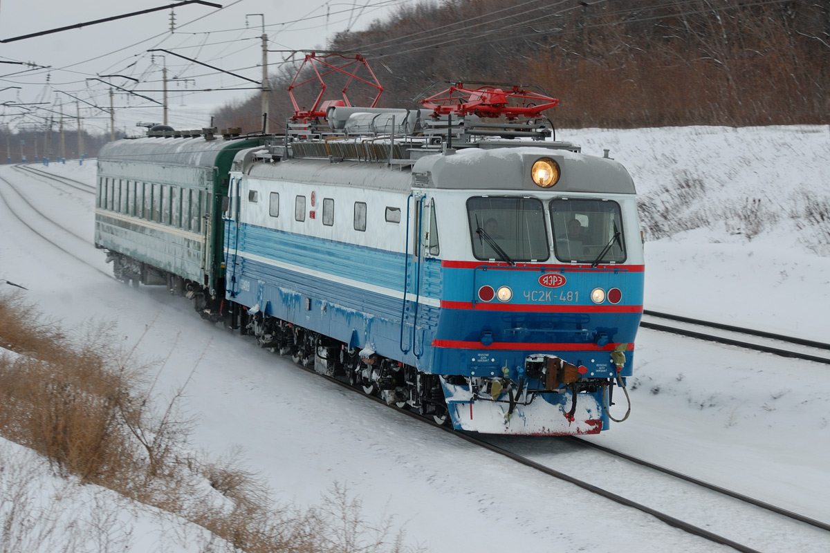 Электровоз ЧС2К-481 с вагоном, перегон Похвистнево - Подбельская КБШ ЖД